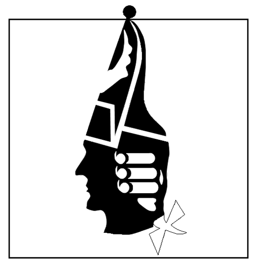 Divisionsabzeichen der 23. Infanterie-Division der Wehrmacht bis Oktober 1942